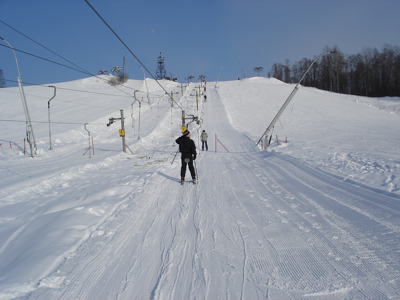 Ski lift in Ohta-park (Russia)